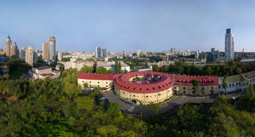 Вид зверху на Башту №5 - одну з башт Київської фортеці